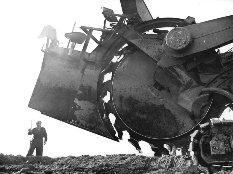 Meliorationsmaschine ADN-ZB Demme 24.3.72 Bez. Erfurt: Hervorragende Leistungen im Meliorationsbau. Die Drainfräse muß von den Meliorationsarbeitern der sozialistischen Brigade, dem Kollektiv Bohn der Keismeliorationsgenossenschaft Einheit Bad Langensalza genau eingerichtet werden, um eine exakte Arbeit zu gewährleistungen. Die Brigade gehört zu den besten Kollektiven im Meliorationsbau des Bezirkes Erfurt. Die Kollegen haben sich vorgenommen, bis zum 31.3.72 den anteilmäßigen Jahresplan mit 25% zu erfüllen. (dazu bitte L0324-1+3N beachten)